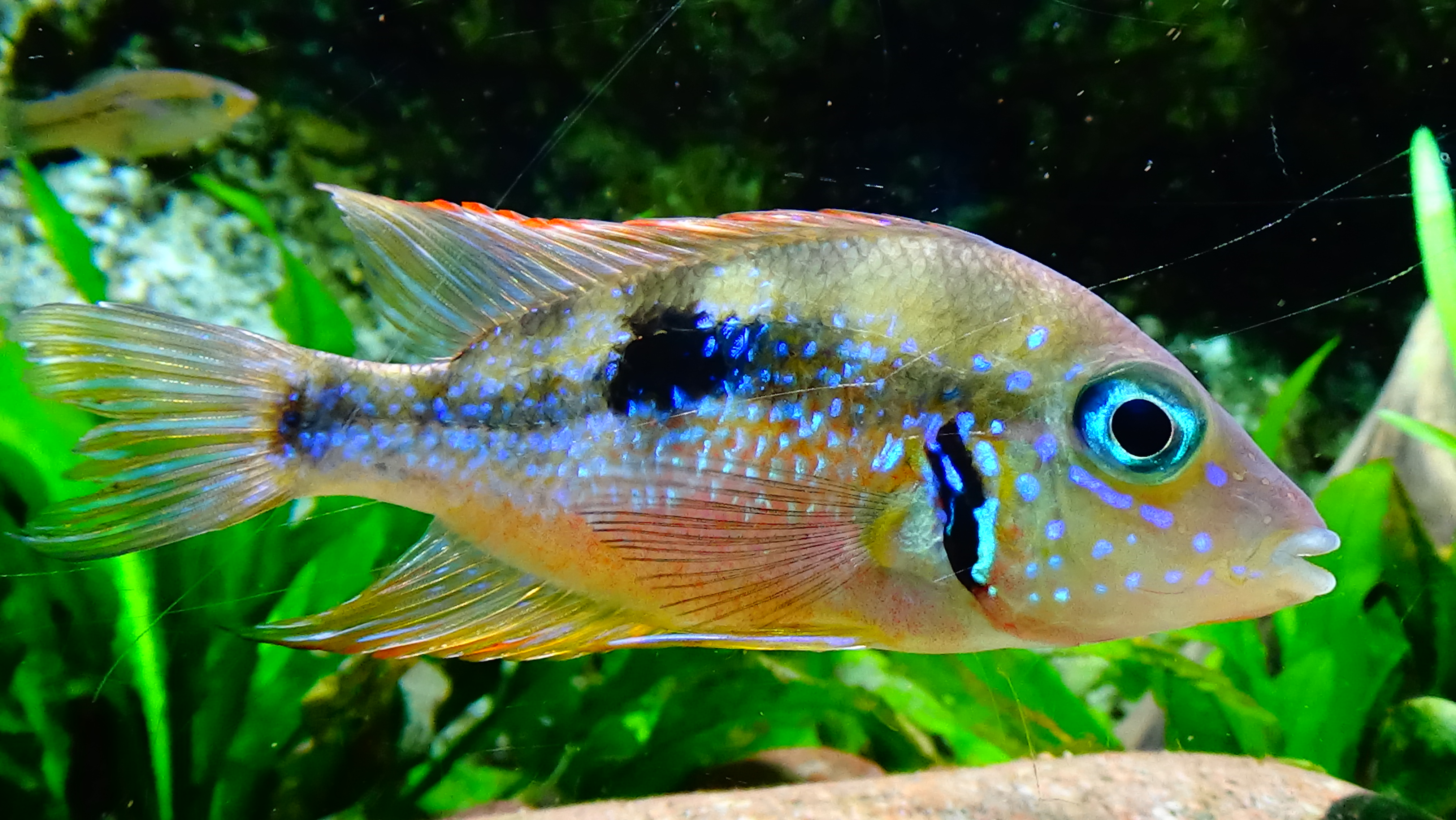 Thorichthys aureus - Aquarium Tropical du Palais de la Porte Dorée - Paris/France